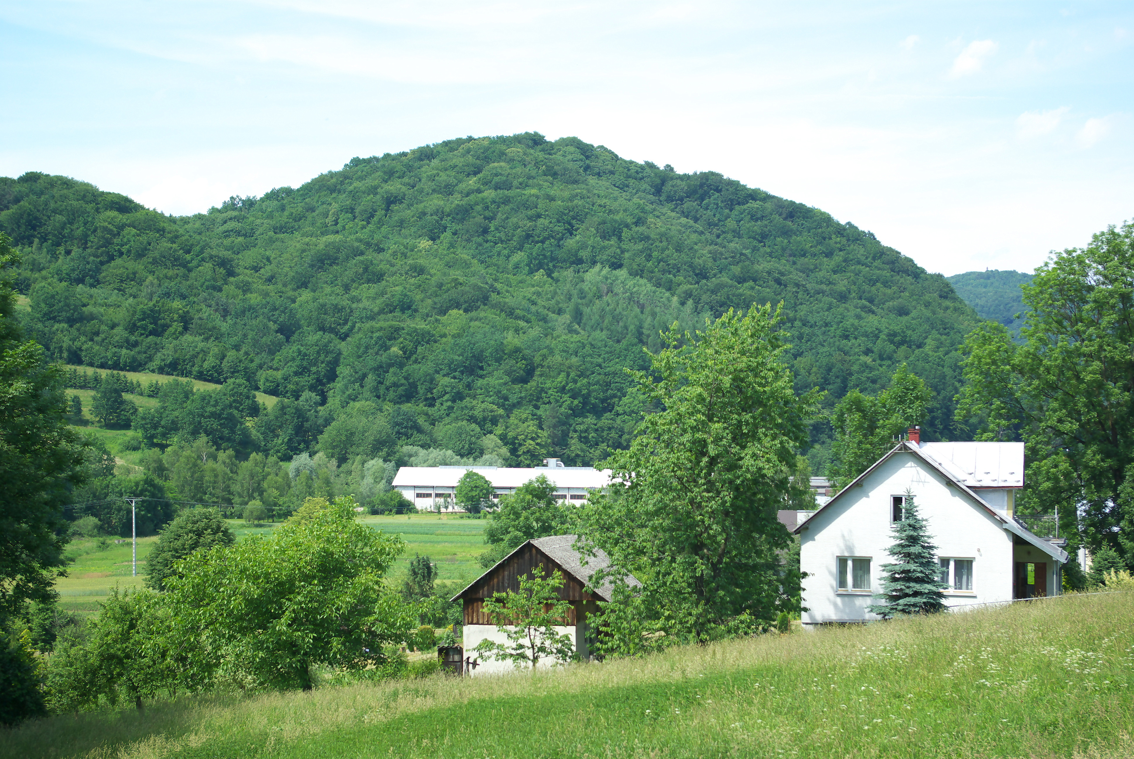 Trepcza